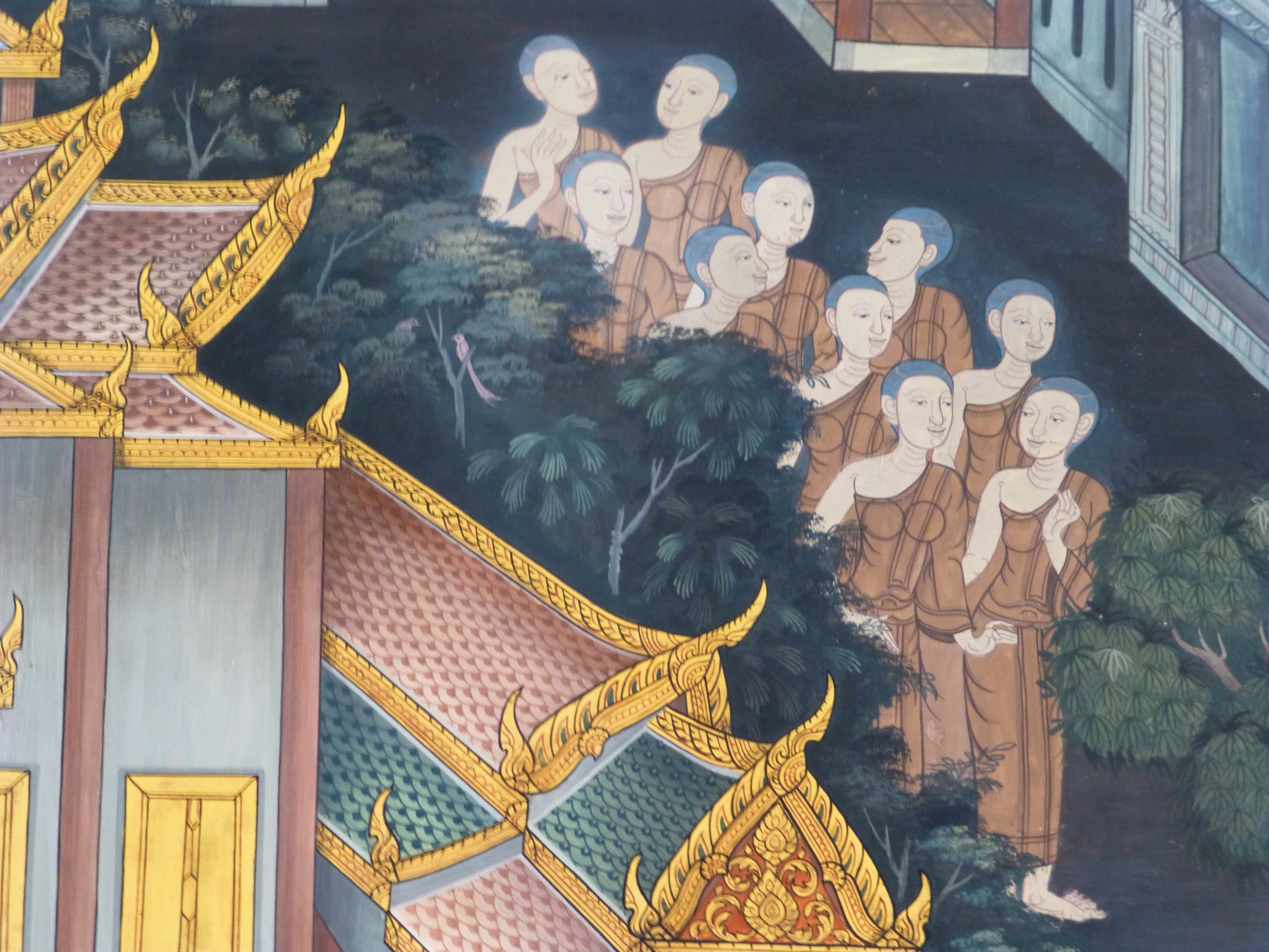 Wat Pho, Bangkok